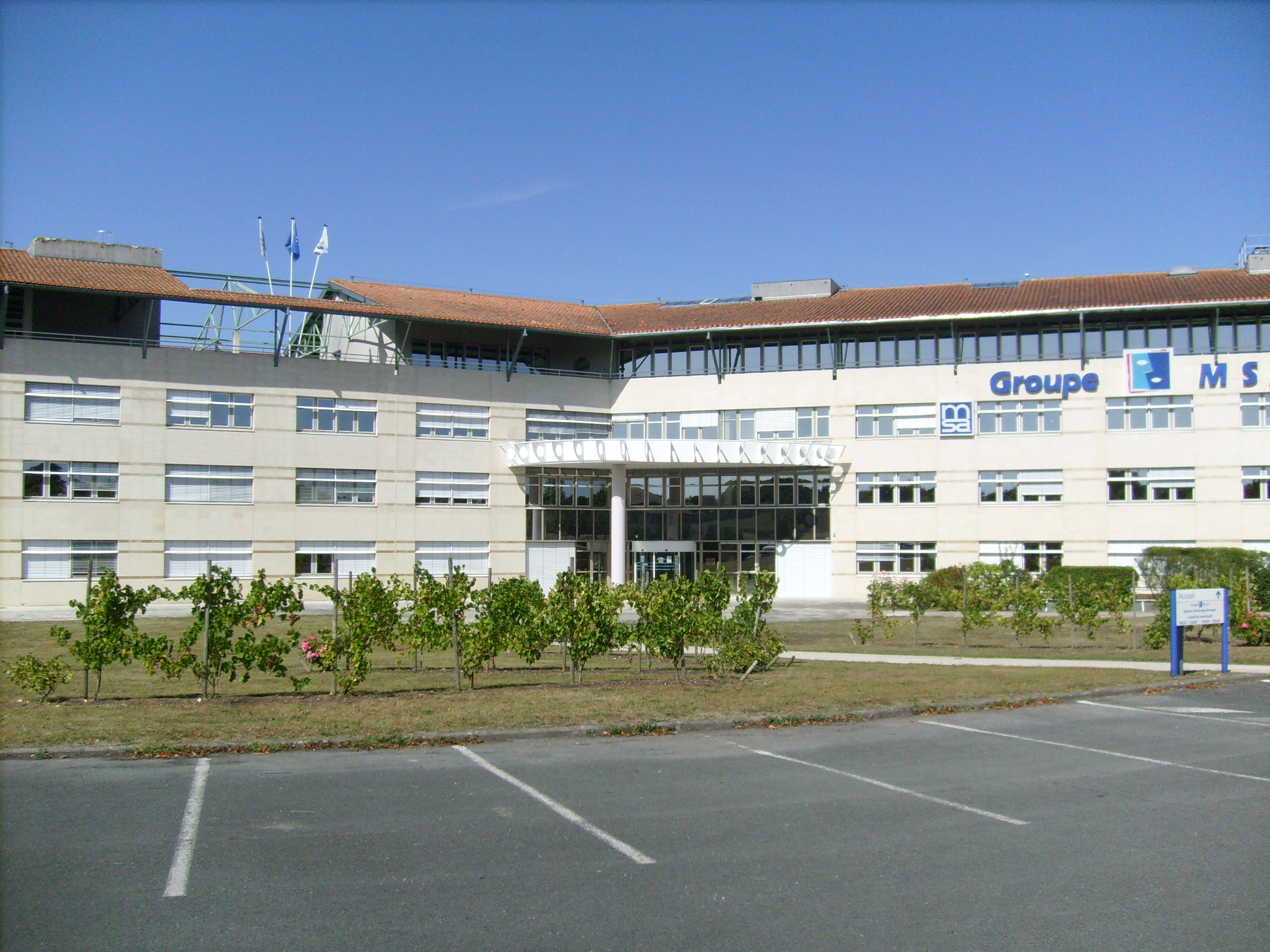 Architecture contemporaine : immeuble de la MSA à Saintes